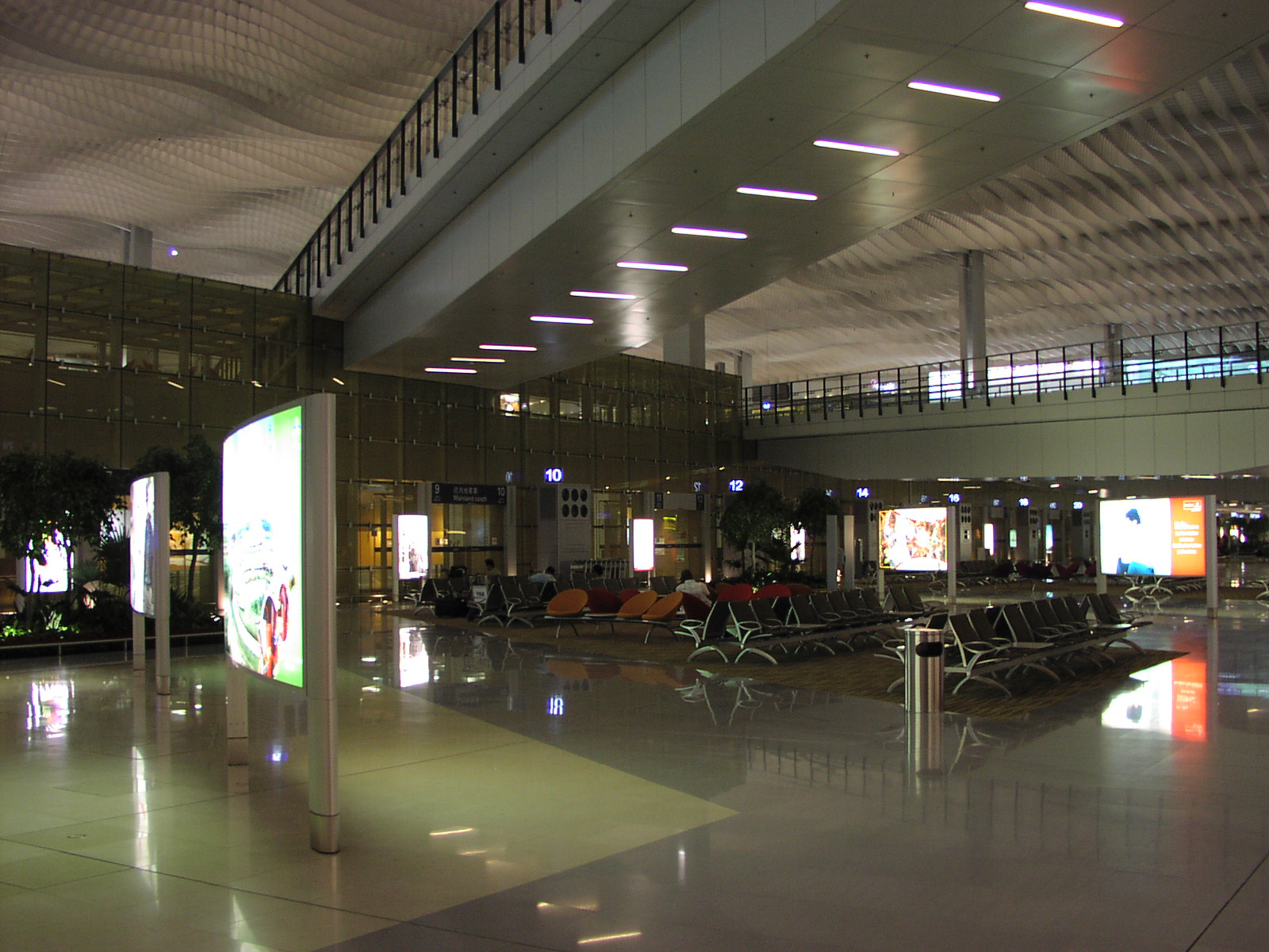 香港國際機場